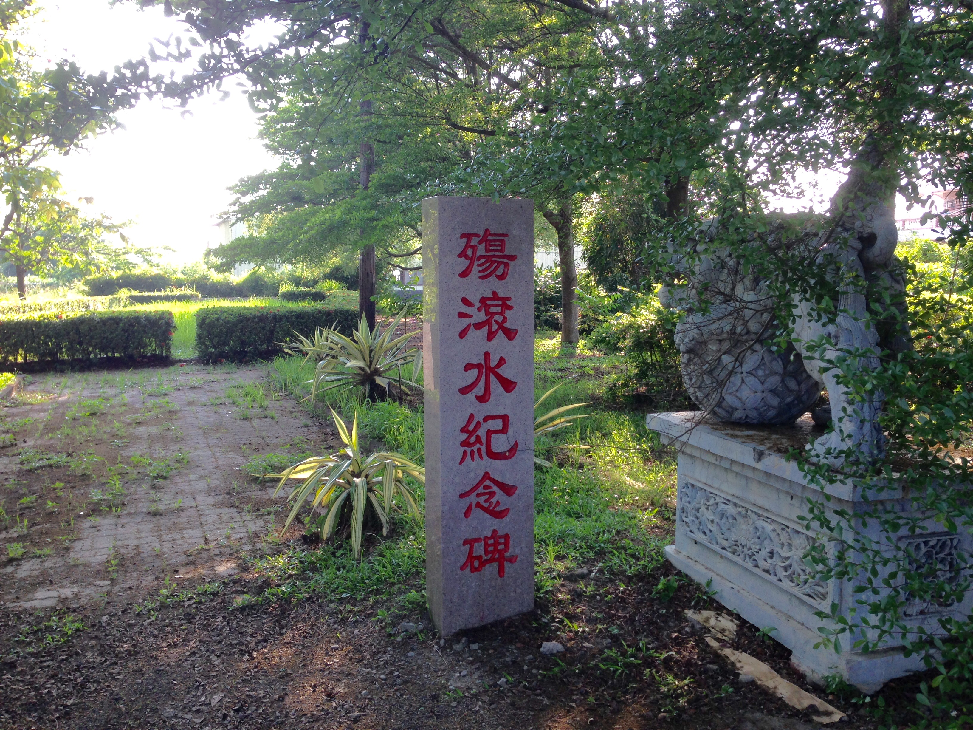 中文（台灣）: 殤滾水紀念碑